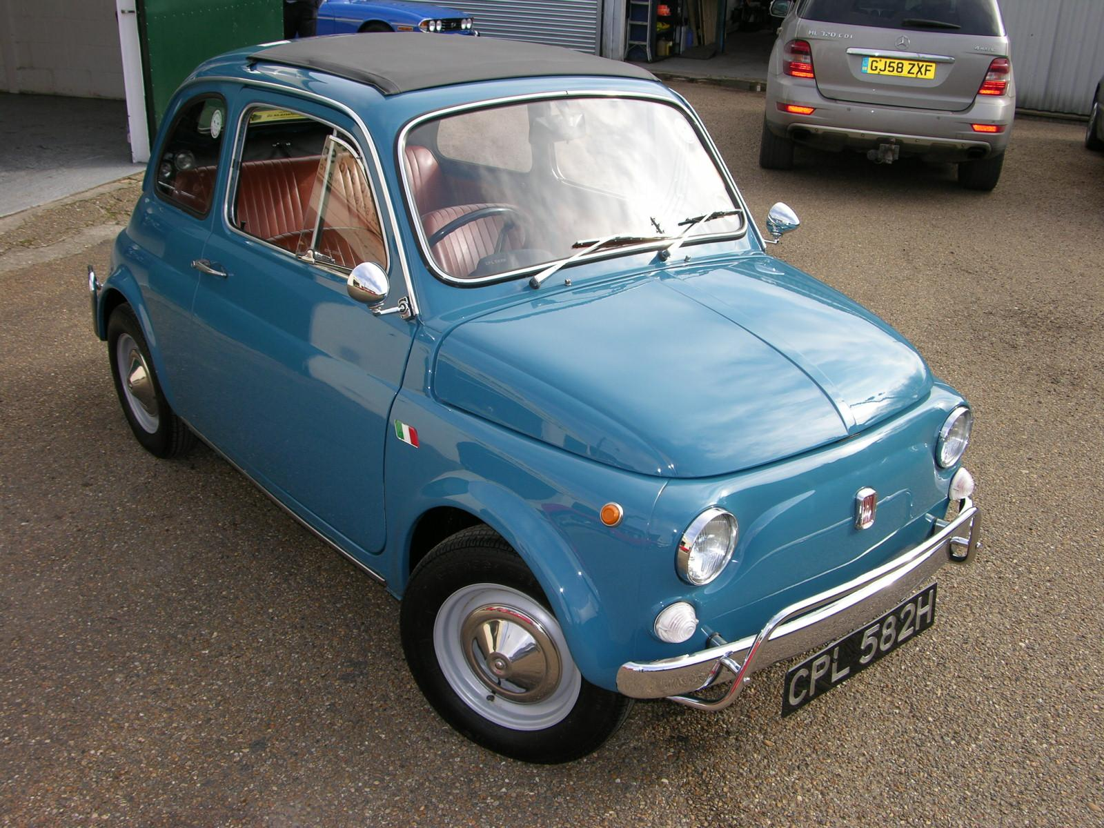 1970 FIAT 500L